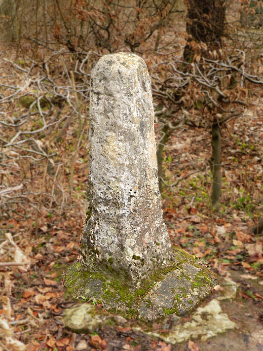 Der Tetztelstein